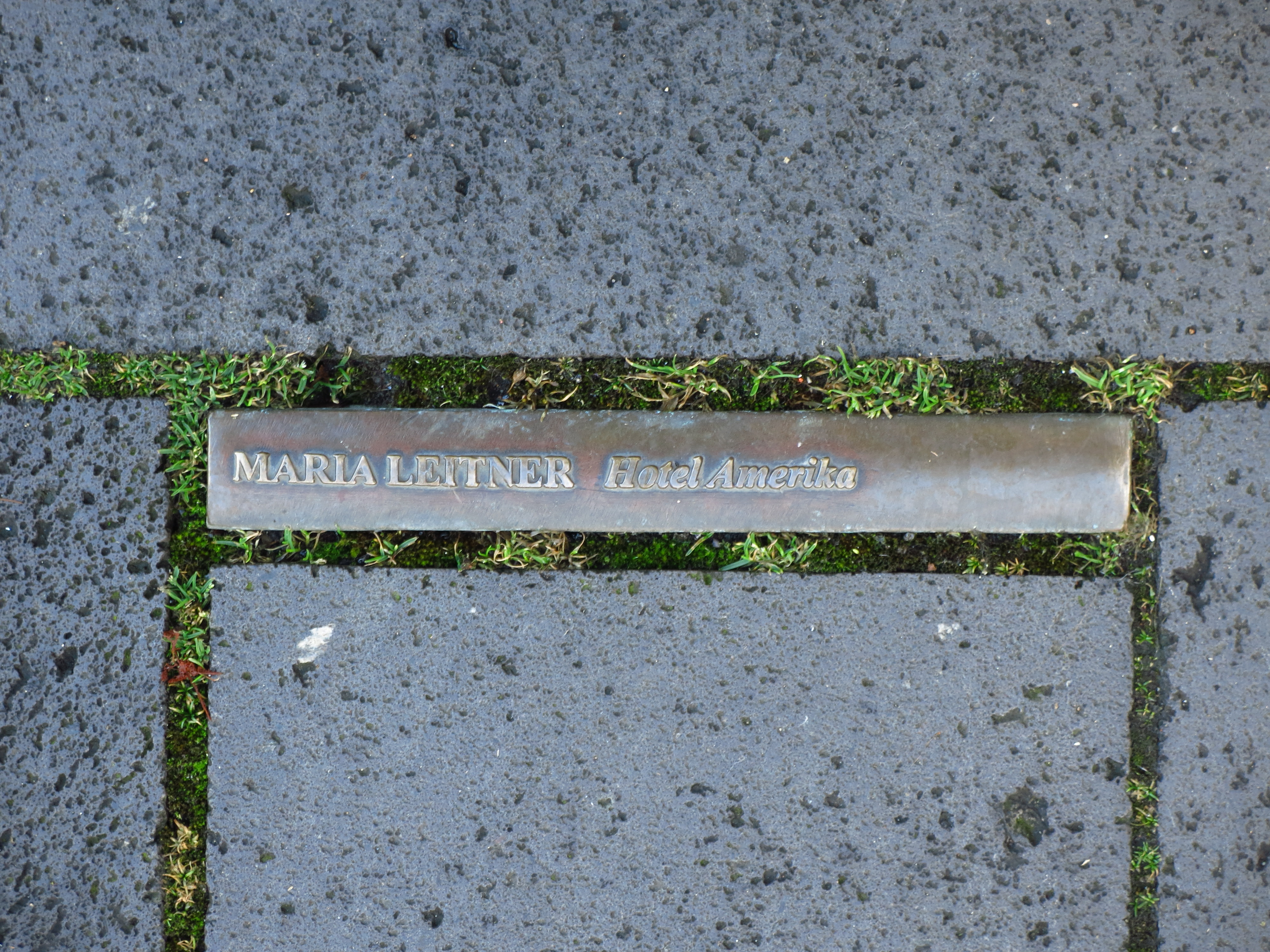 Das Mahnmal zur Bücherverbrennung auf dem Bonner Markt; In das Pflaster des Bonner Markt sind insgesamt 60 sichtbare Buchrücken, sogenannte „Lesezeichen“, verteilt, die sich an der Rathaustreppe, dem Ort an dem die Bücher am 10. Mai 1933 verbrannt wurden, verdichten. Zusätzlich wurde ein wetterfester Archiv-Behälter in Form einer Büchertruhe in den Platz eingelassen. Seine Inschrift benennt das Ereignis und weitere Autoren von verbrannten Büchern.